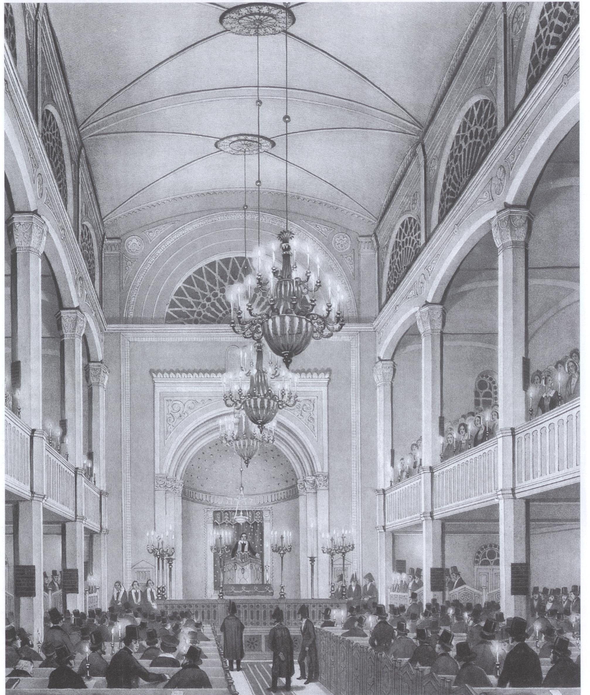 Neuer Tempel Poolstraße bei Eröffnung, Lithographie von um 1844